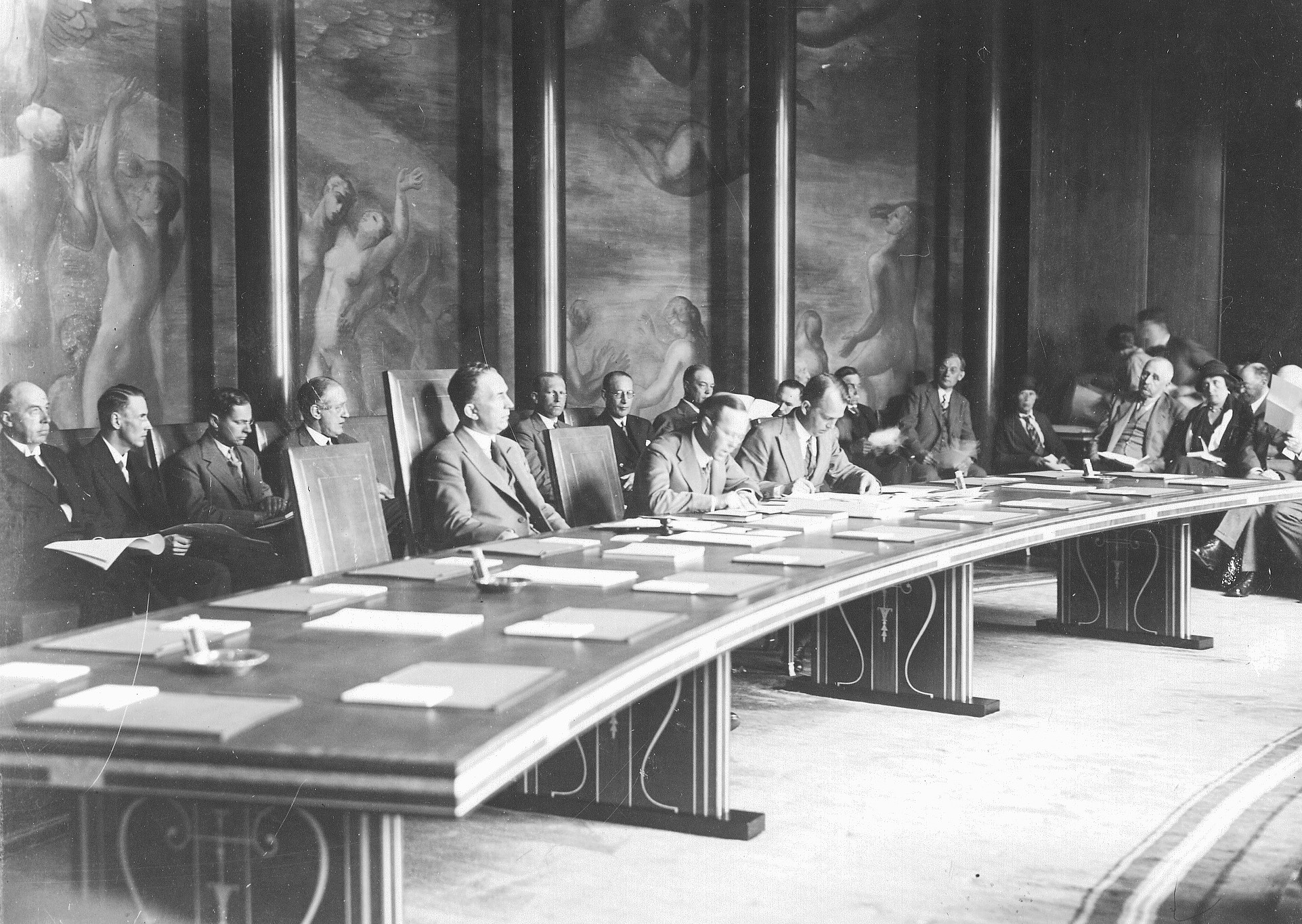 Tändstickspalatset Sessionssalen / Styrelserummet med Assar Gabrielsson på ordförandeplatsen